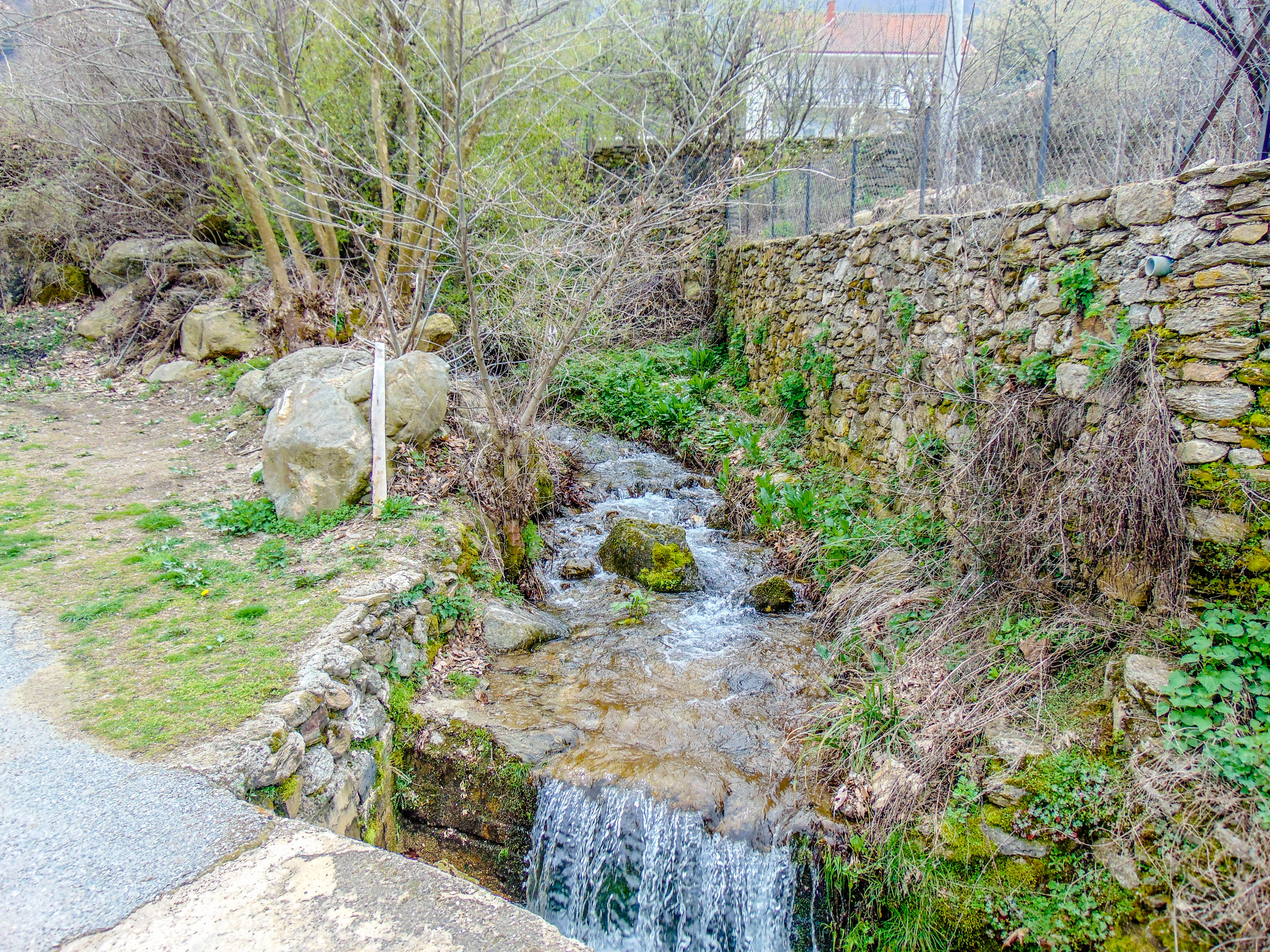 Дражево